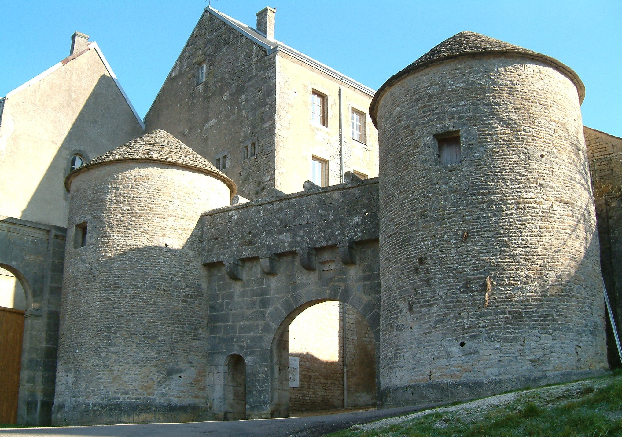 Porte de la ville, Flavigny-sur-Ozerain, Bourgogne, FRANCE